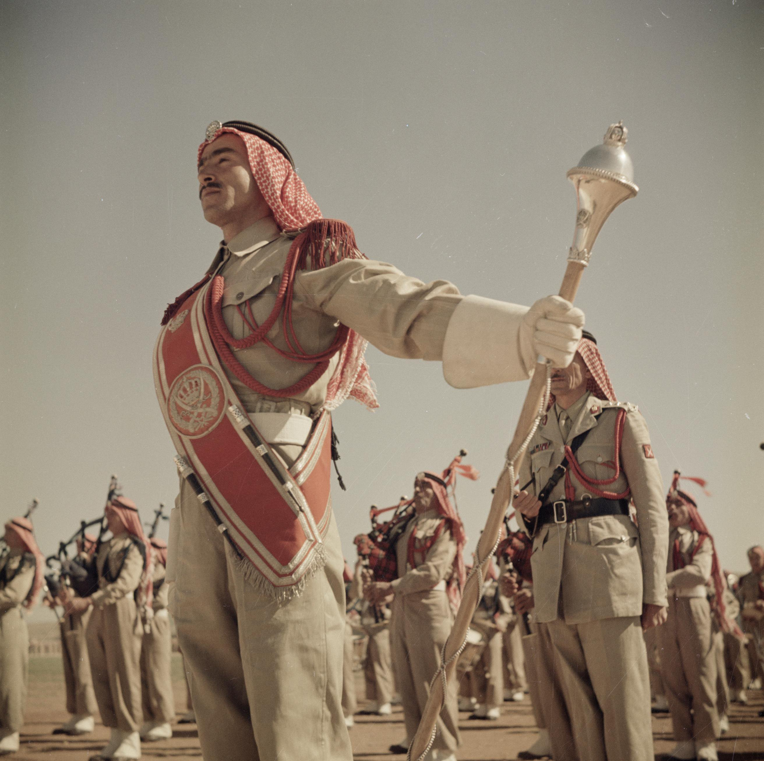 Collectie / Archief : Fotocollectie Van de Poll Reportage / Serie : Midden Oosten: Jordanië 1953 Beschrijving : Muziekkorps van de koninklijke lijfwacht Annotatie : Kleurenfoto Datum : 1 januari 1953 Locatie : Jordanië Trefwoorden : doedelzakken, militaire parades, militairen, muziekkorpsen Fotograaf : Poll, Willem van de Auteursrechthebbende : Nationaal Archief Materiaalsoort : Negatief (zwart/wit) Nummer archiefinventaris : bekijk toegang 2.24.14.02 Bestanddeelnummer : 255-9751